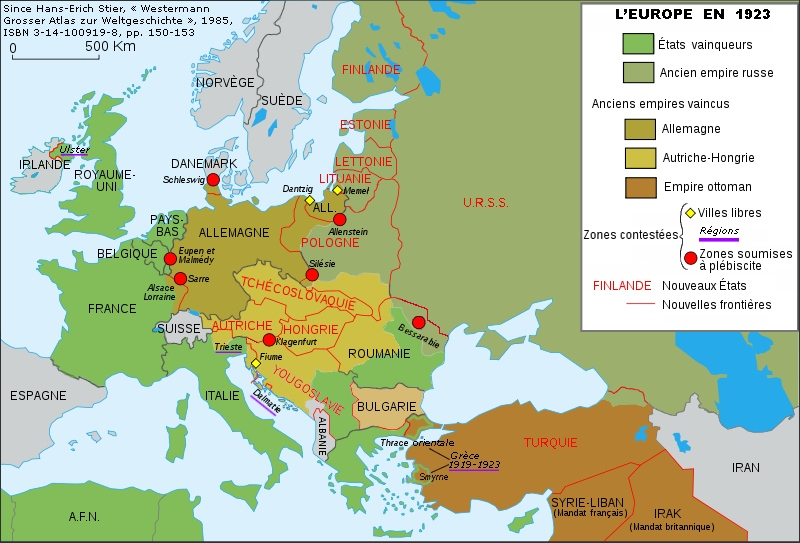 D'après Bibi Saint-Pol, modifié d'après Hans-Erich Stier : Westermann Grosser Atlas zur Weltgeschichte, 1985, ISBN 3-14-100919-8, pp. 150-153